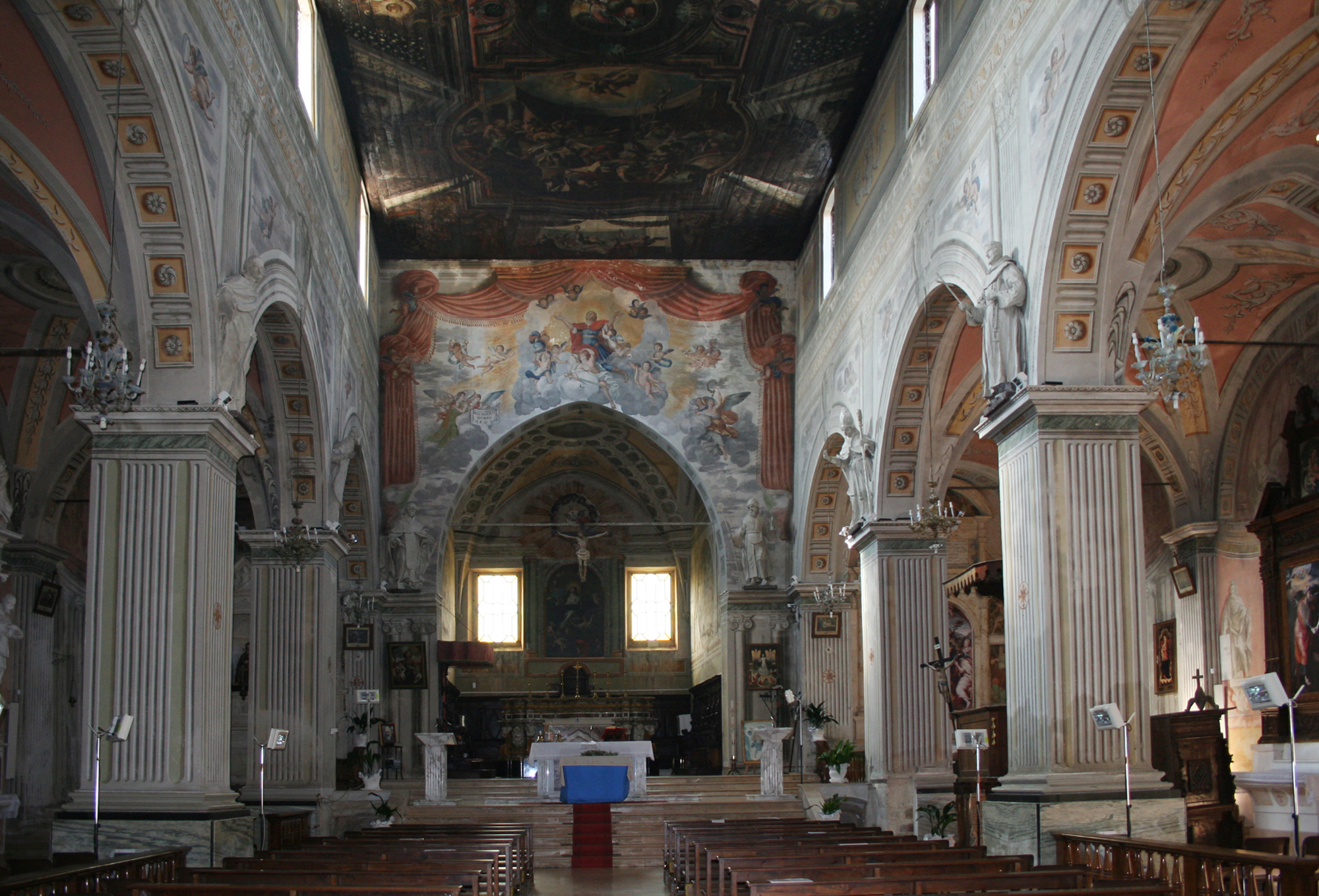 Aula liturgica della Chiesa di Santa Maria in Platea di Campli in provincia di Teramo. Immagine scattata nell'anno 2014.